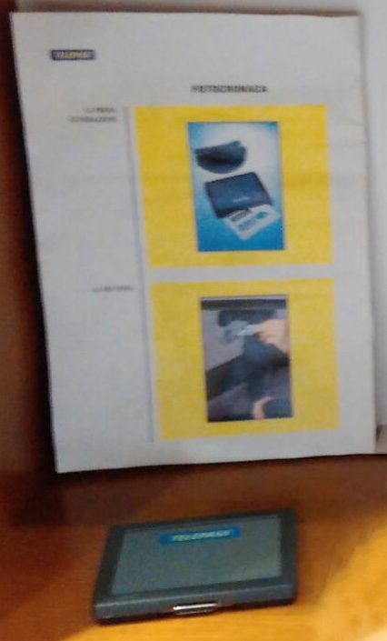 Telepass nella versione iniziale con alloggiamento per carta C-Less